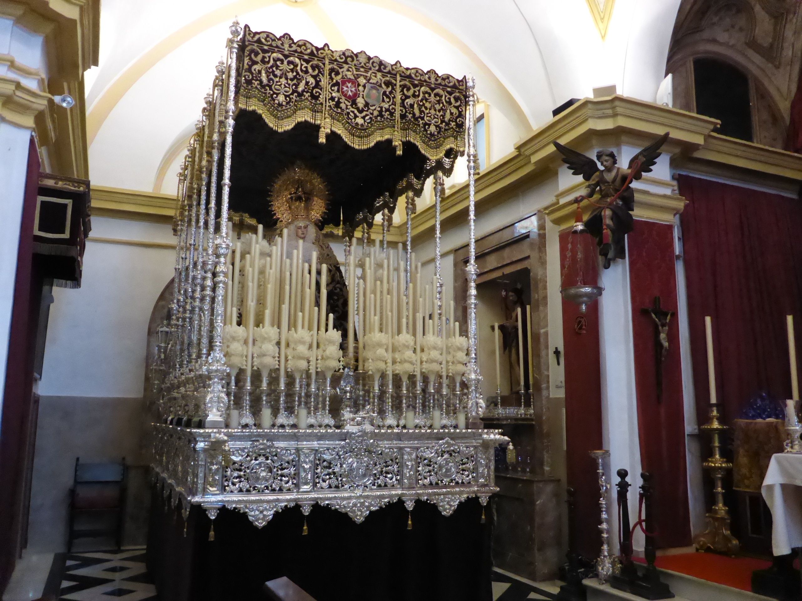 Interior de la Capilla del Refugio de Nuestra Señora de los Desamparados de Jerez de la Frontera (Andalucía, España)